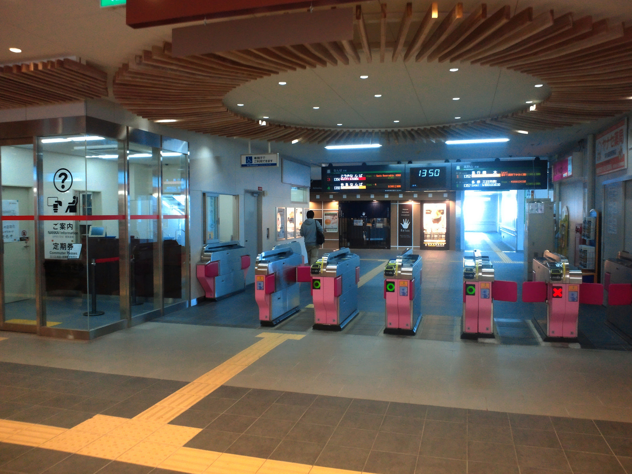 南海河内長野駅改札